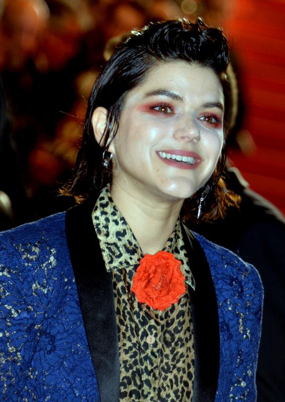 Soko au festival de Cannes